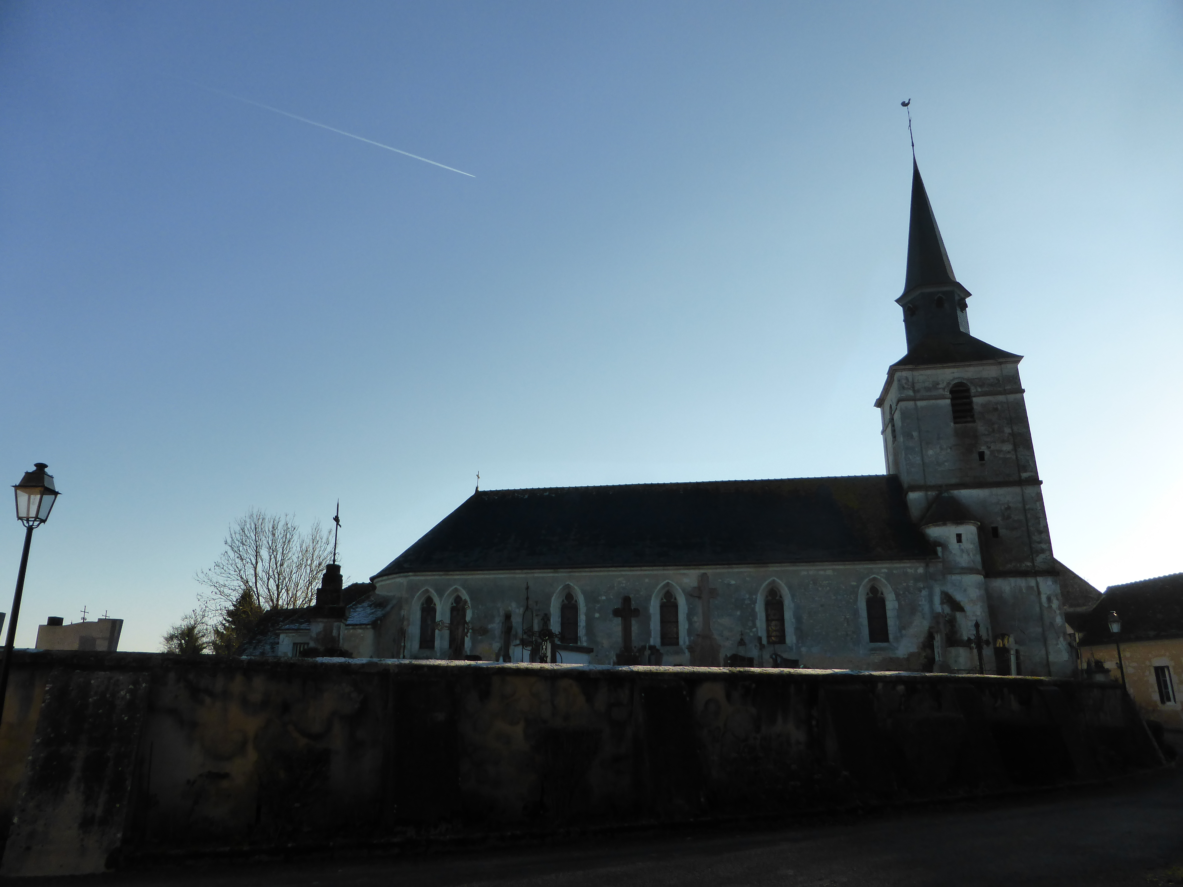 Église Saint-Ouen de Saint-Ouen-de-la-Cour, dans l'Orne.